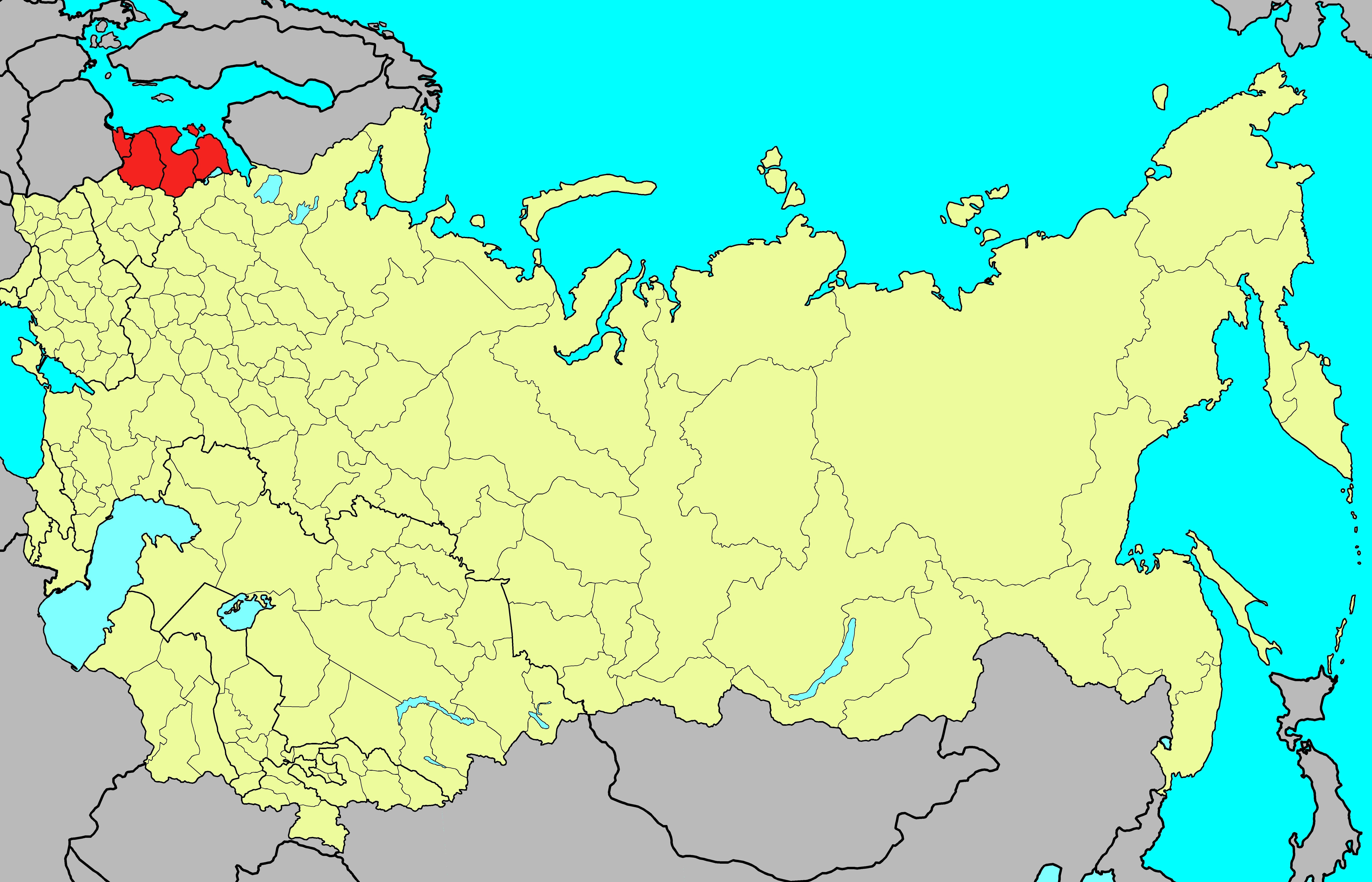 Прибалтийский военный округ ВС СССР на 1991 год